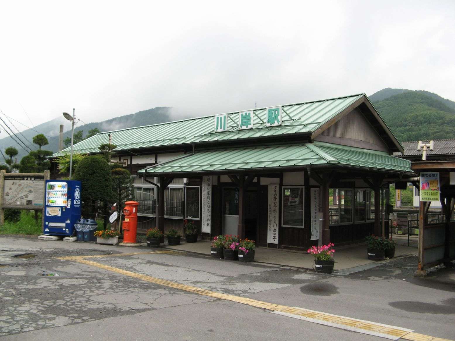 中央本線川岸駅 駅舎 2007年8月 Bakkai撮影